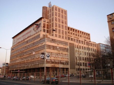 Фотографија зграде Државне штампарије архитекте Драгише Брашована саграђене 1934-1941. (данас Зграда БИГЗ-а) Аутор фотографије: Nicolo